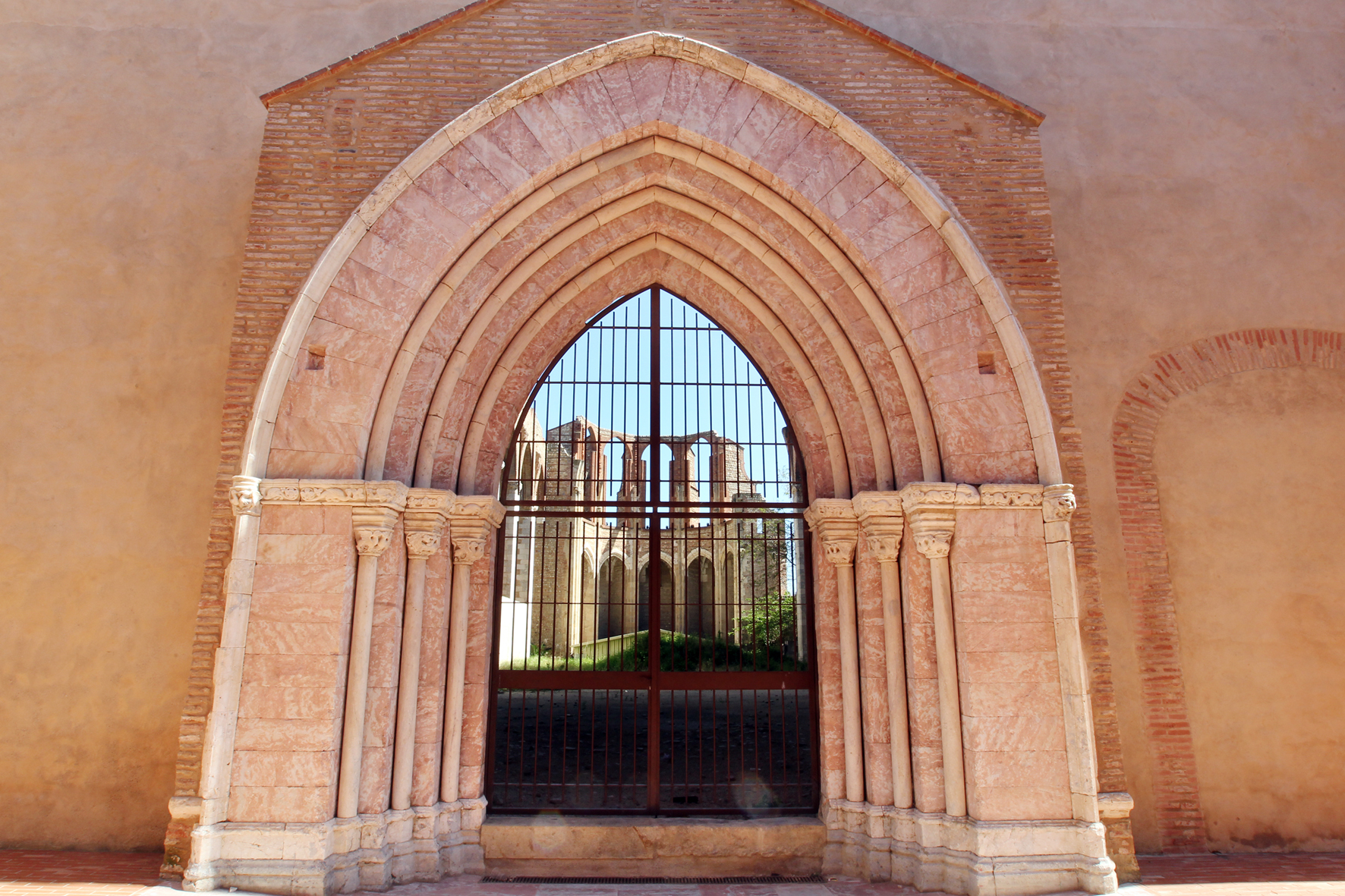 Le couvent des Carmes se trouve face à la caserne militaire et le lycée Jean Moulin. Il fut édifié vers le milieu du 13e siècle.